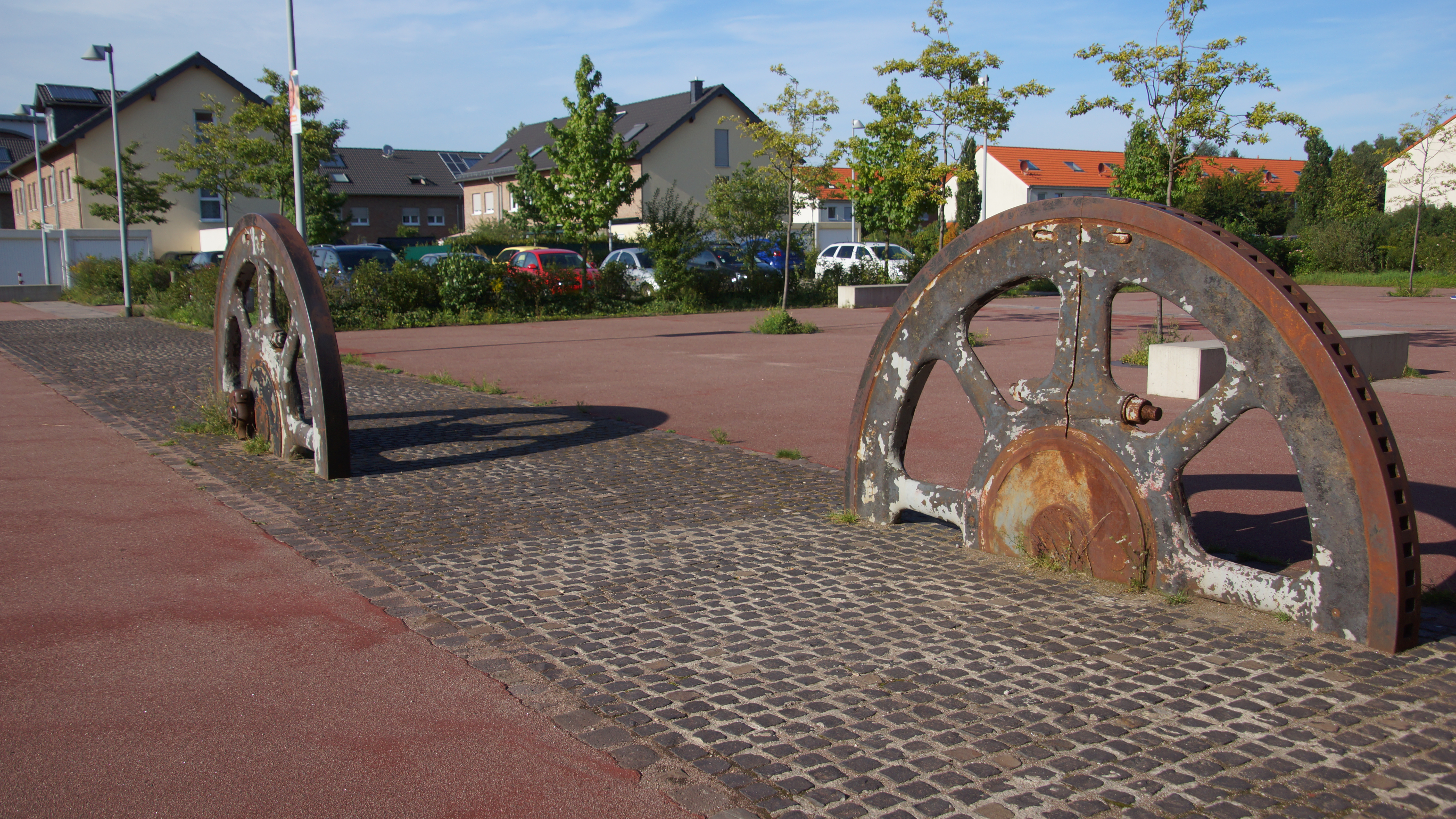 Bauteile Brikettfabrik Grube Carl